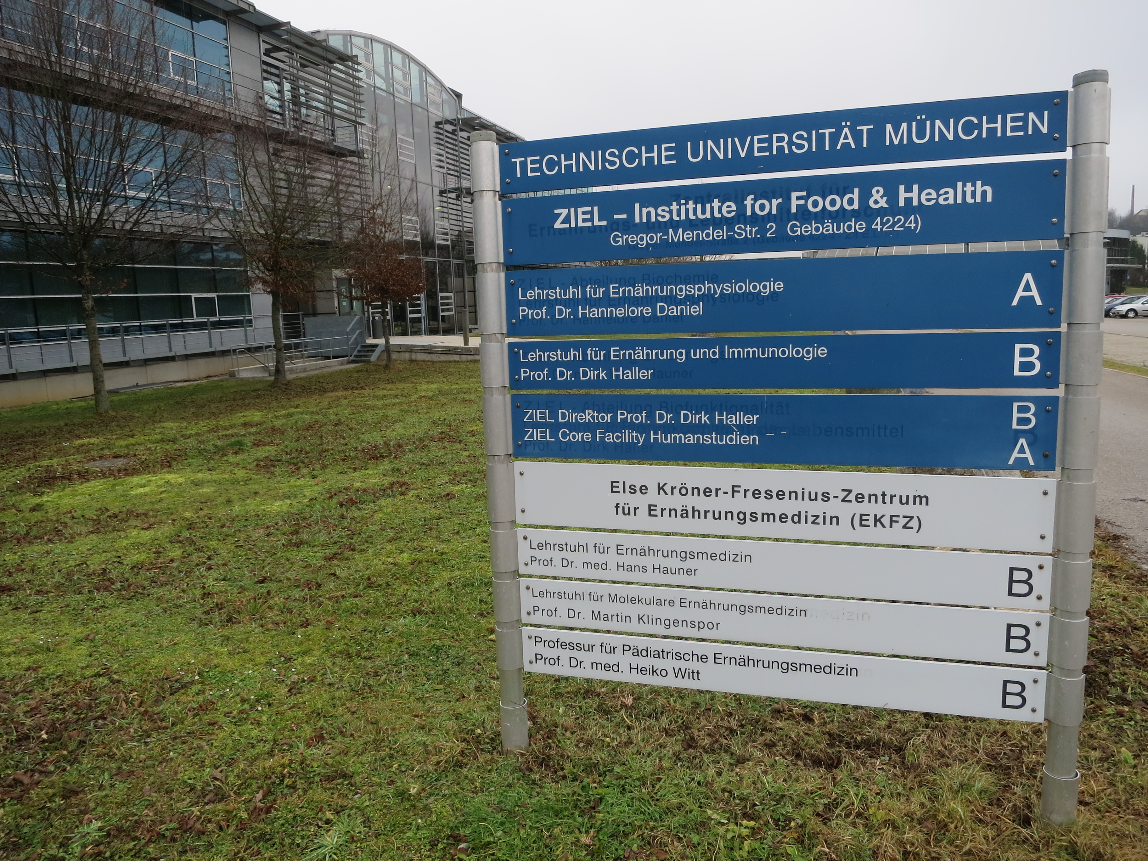 ZIEL - Zentralinstitut, Institute for Food & Health